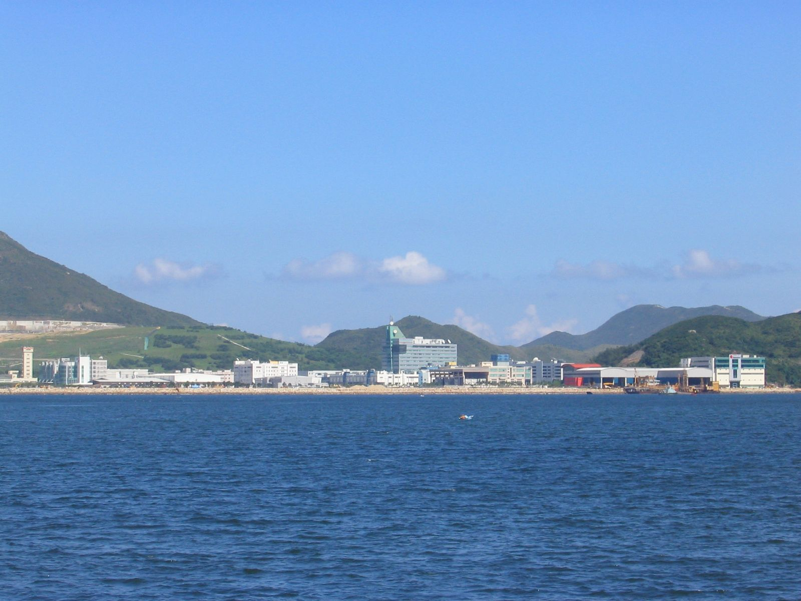 將軍澳工業邨 Tseung Kwan O Industrial Estate